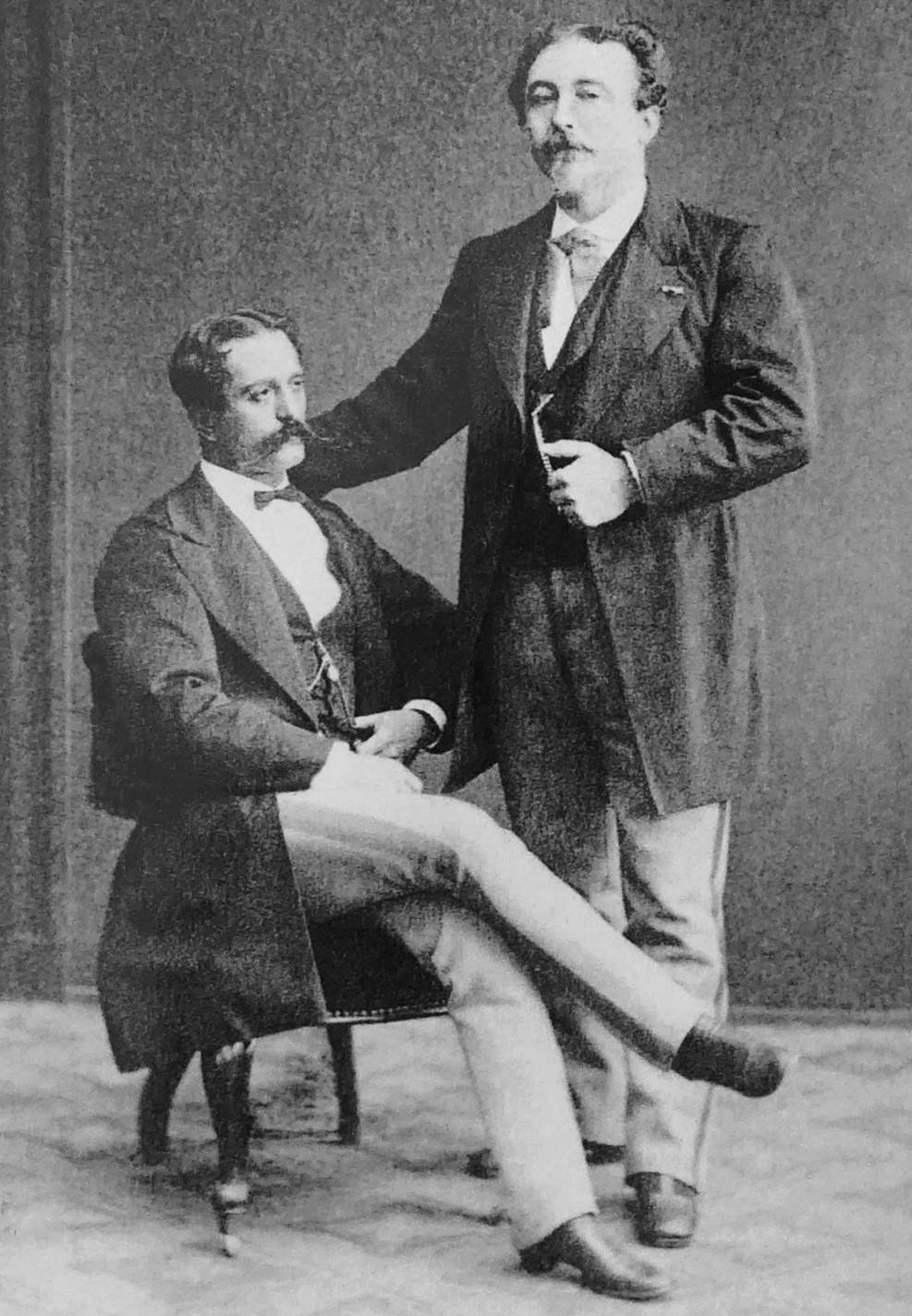 Ohan Demirgian sittandes med okänd person